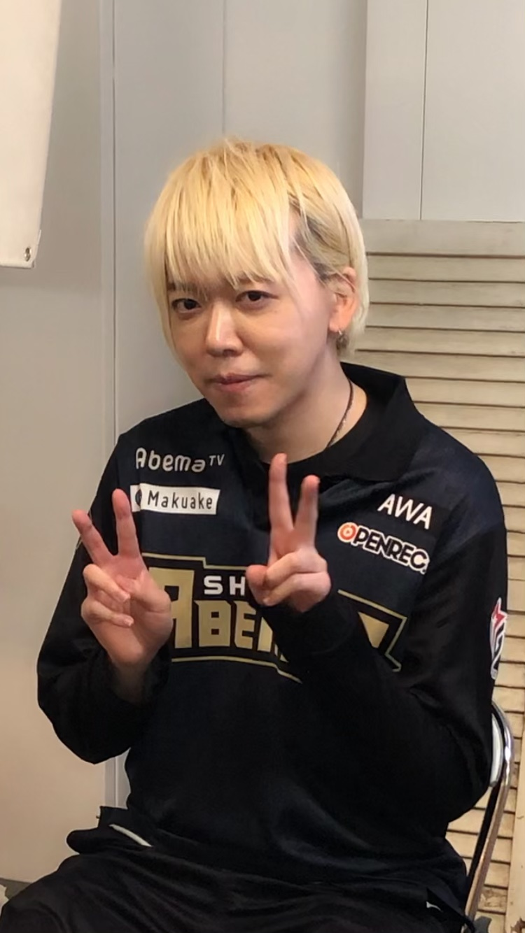 Mリーグ2019/3/30渋谷ABEMAS白鳥翔